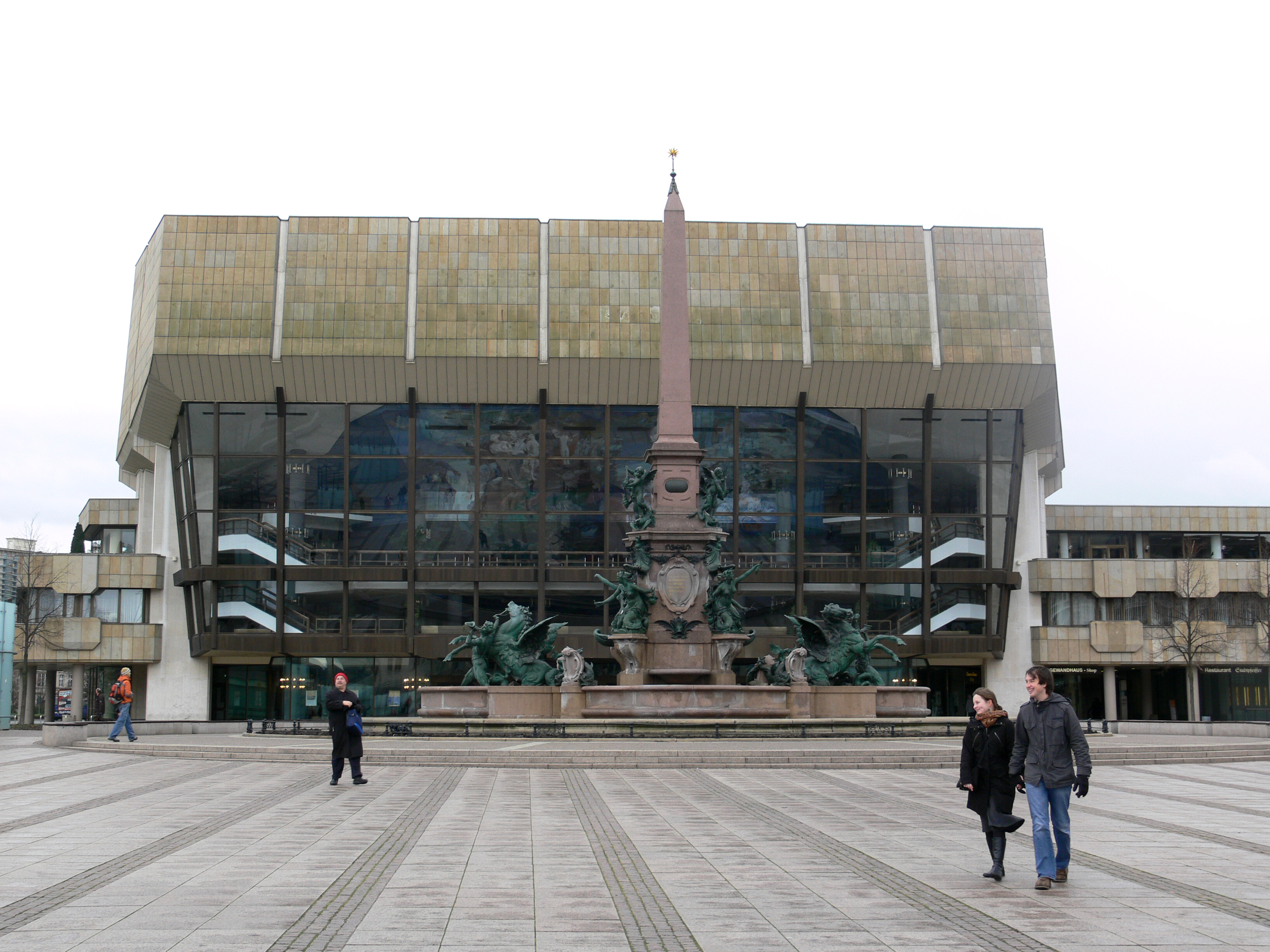 Neues Gewandhaus, Augustusplatz, Leipzig